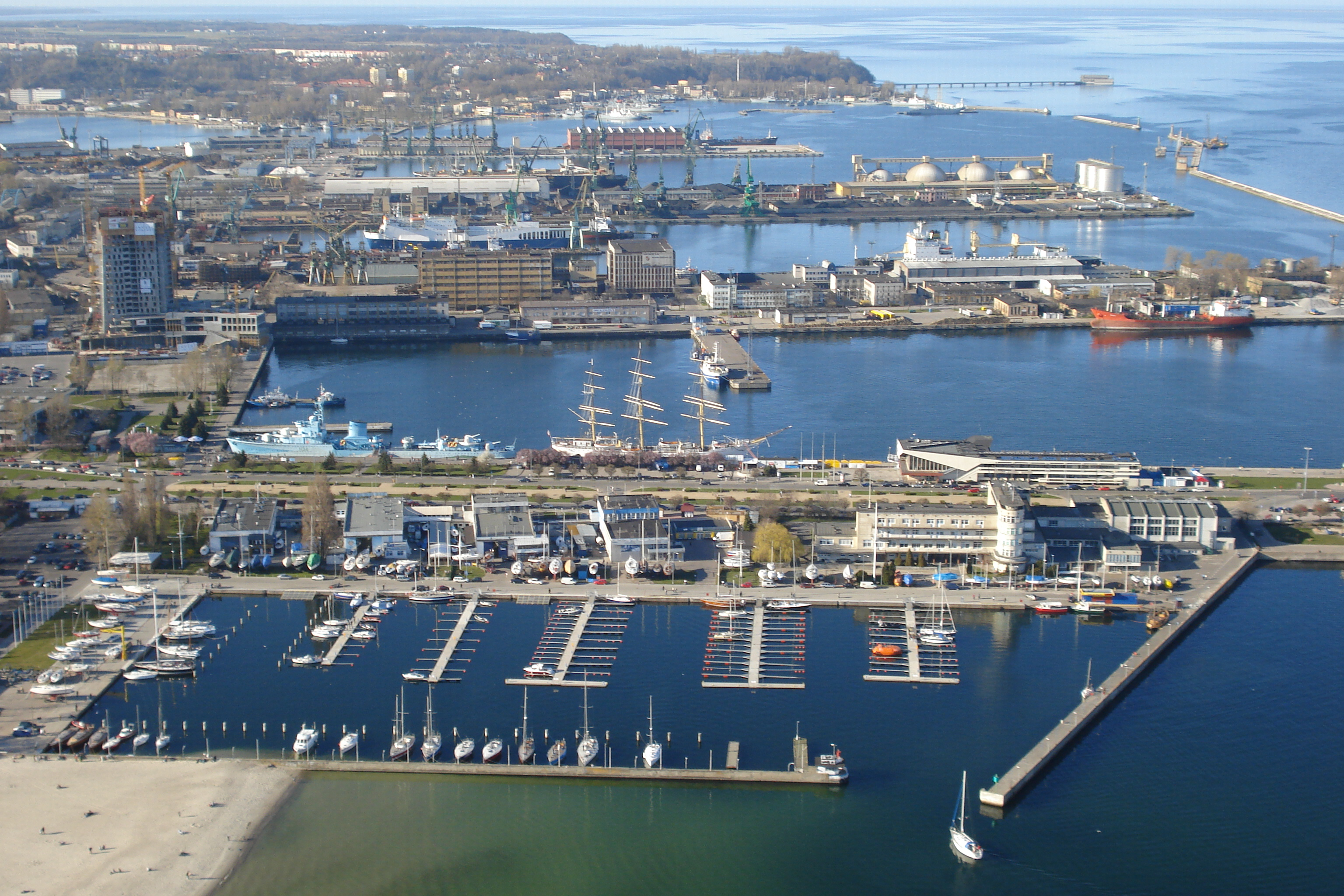 Gdynia z "lotu ptaka"